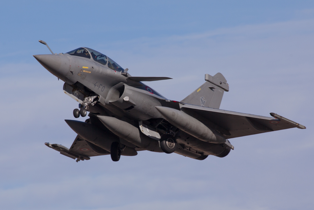 Rafale de Armée de l’Air